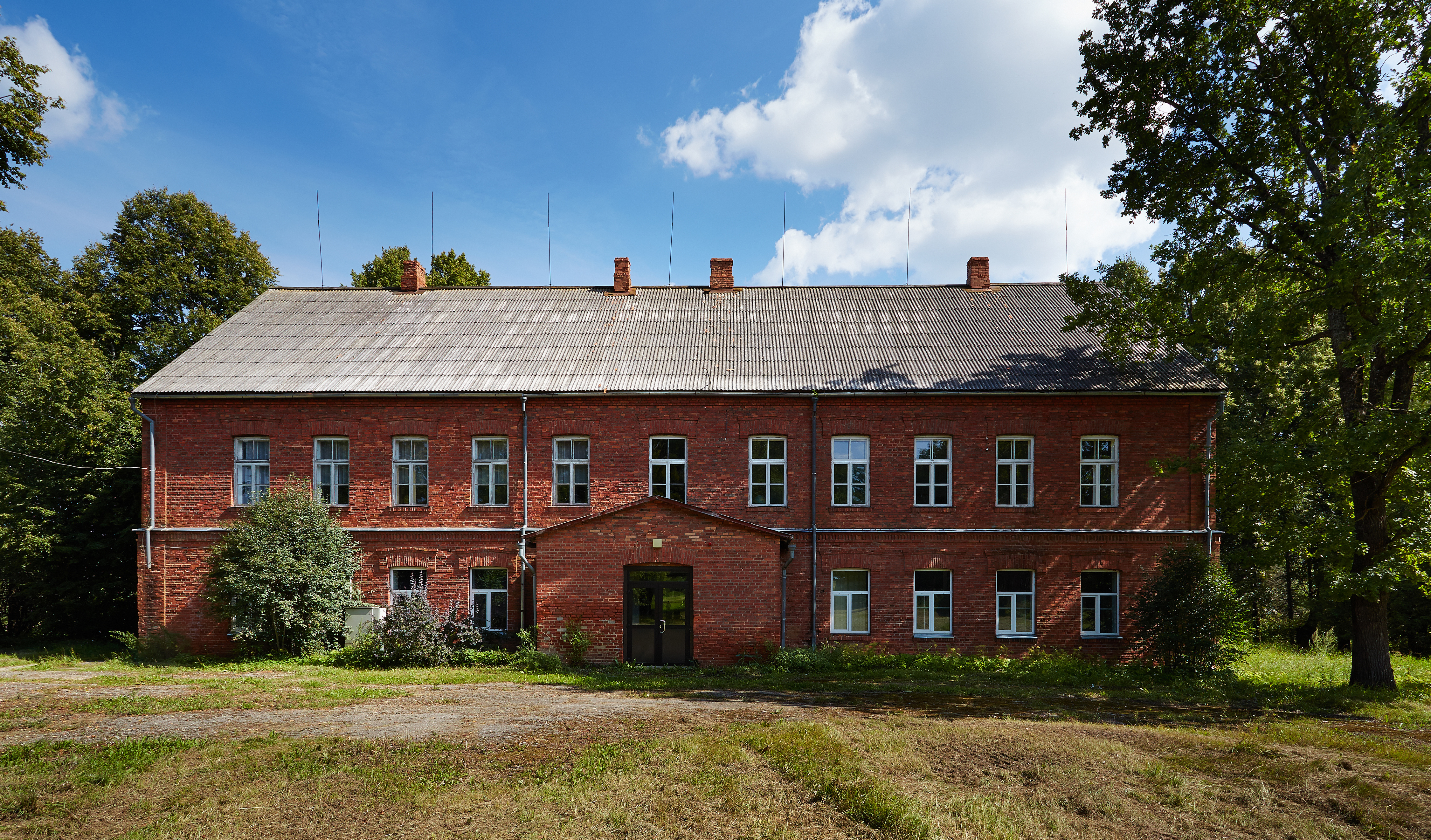 Tsooru (Lepistu) ministeeriumikooli hoone 2013. aasta augustis